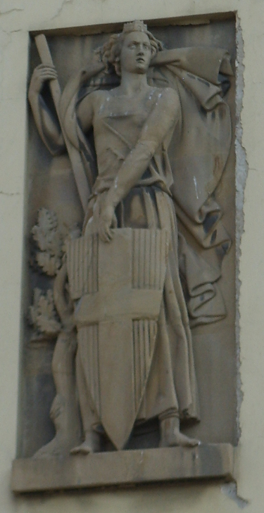 Caserma della Scuola allievi ufficiali dei Carabinieri, bassorilievo con figura femminile e stemma carabinieri